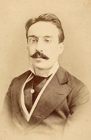 O escritor Eça de Queirós em Havana em 1873.